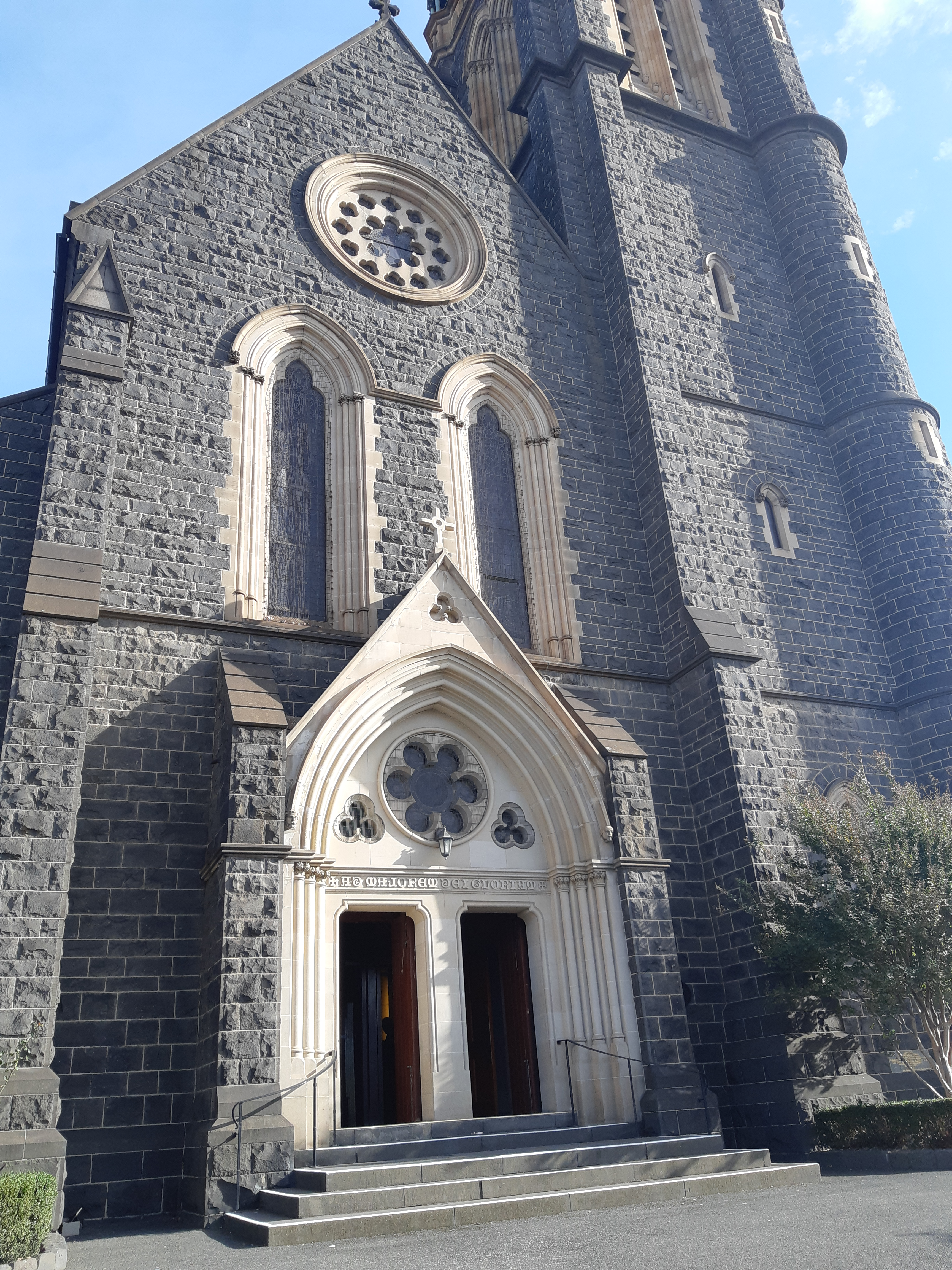 Saint Ignatius Richmond